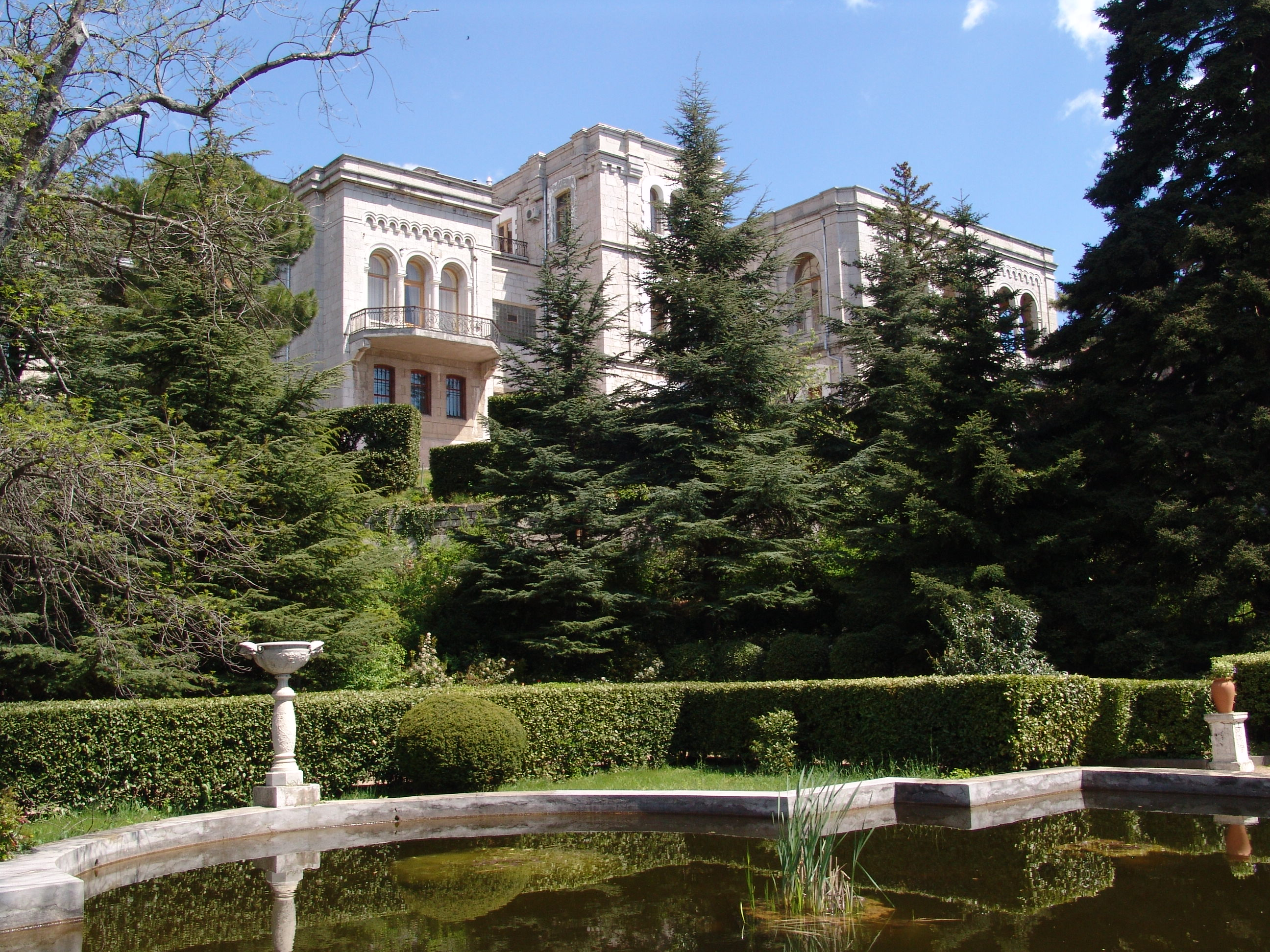 Пруд Юсуповского дворца